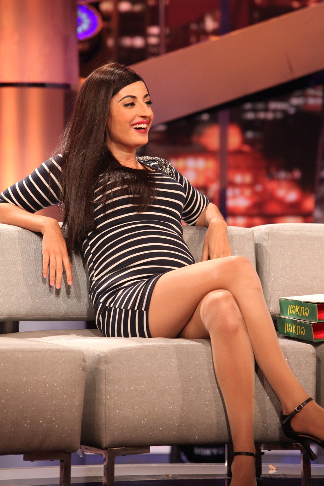 יפית אסולין כאופירה אסייג, מתוך "נבחרת ישראל בטלוויזיה"